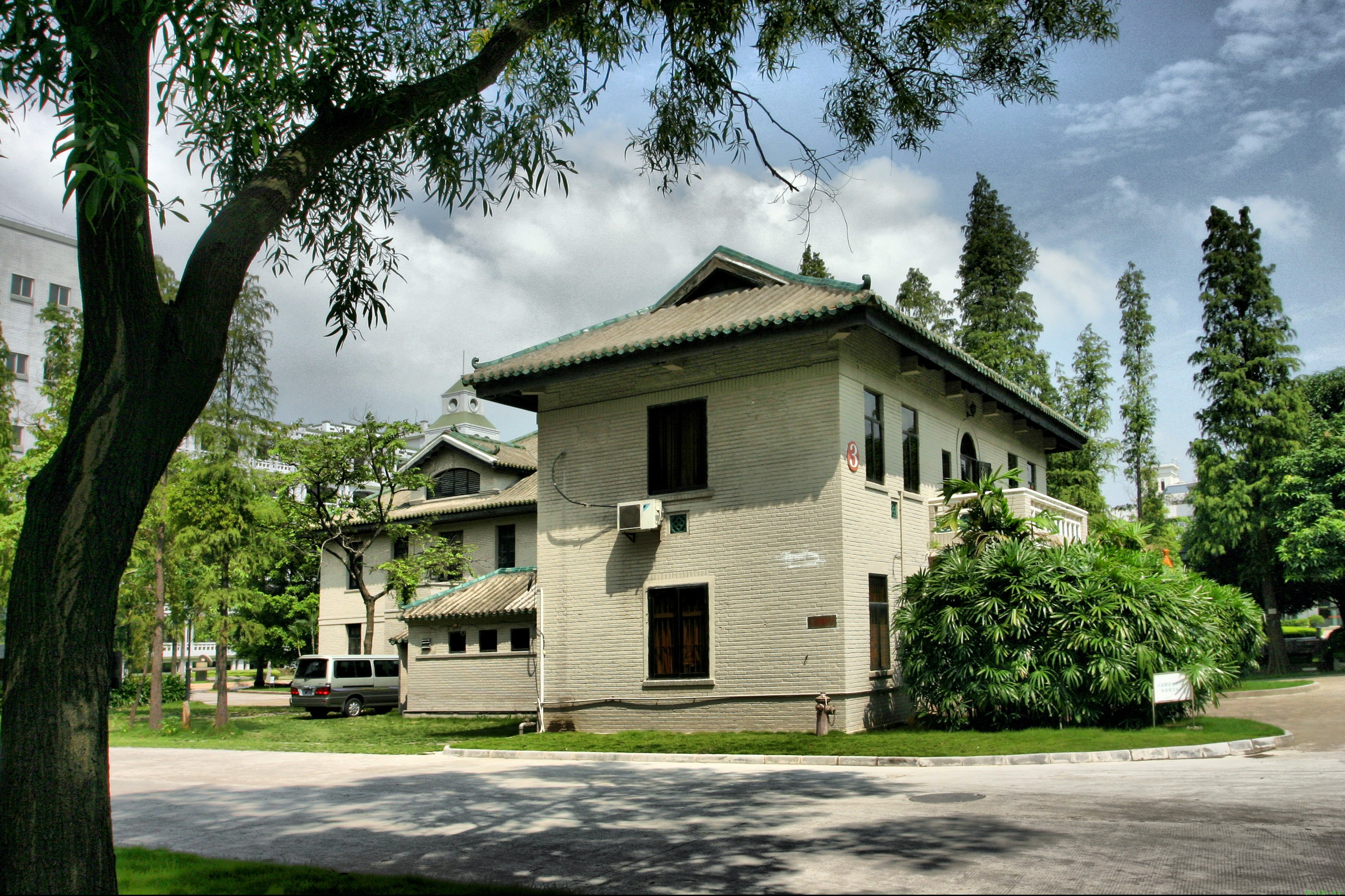 老校长楼（正面）